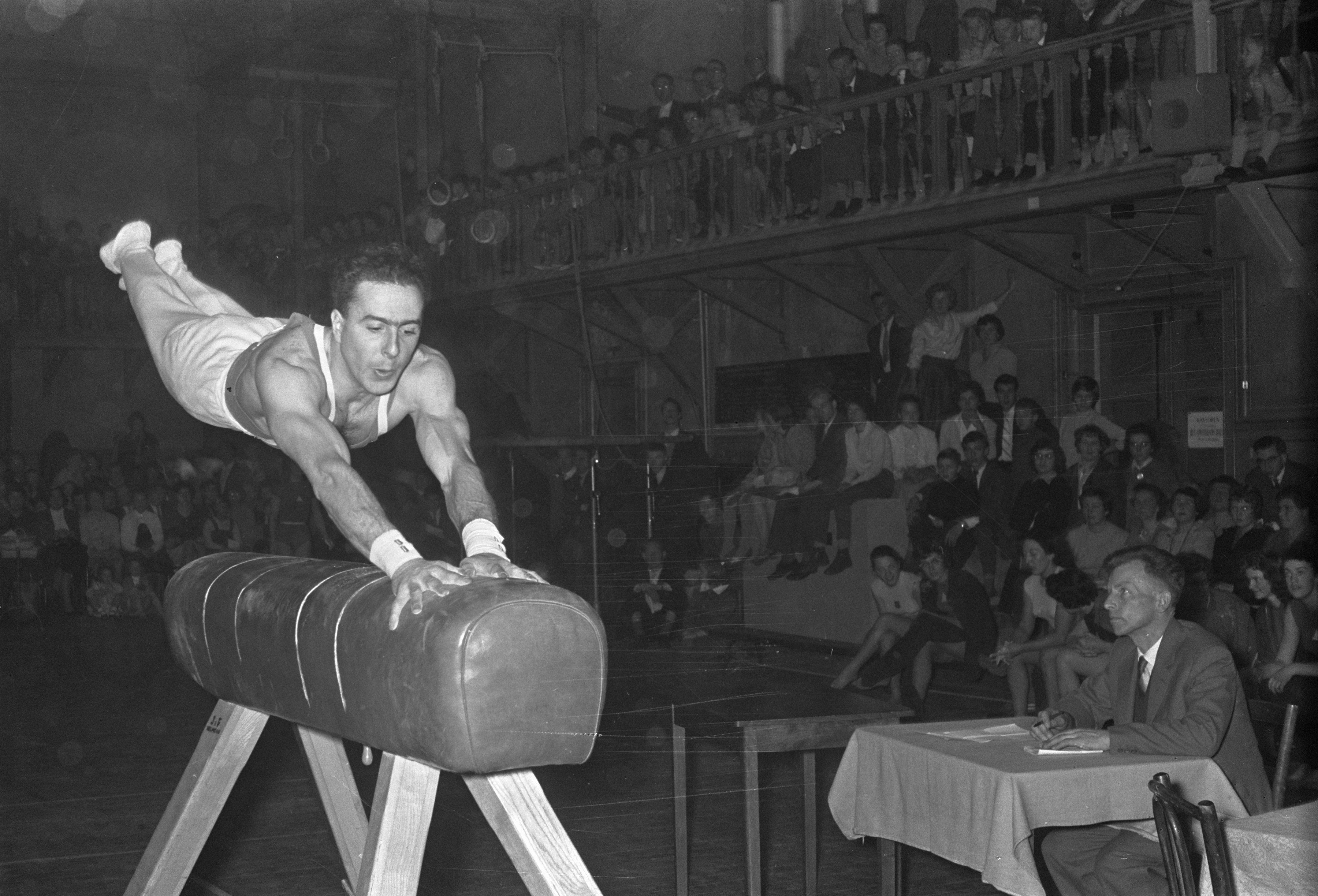 Collectie / Archief : Fotocollectie Anefo Reportage / Serie : [ onbekend ] Beschrijving : Jaarlijkse turnwedstrijden "Steenwedstrijden" in de Amsterdamse turnhal, winnaar bij heren Joost Blits in actie Datum : 20 december 1959 Trefwoorden : ACTIE, Winnaars, turnhallen, turnwedstrijden Persoonsnaam : Joost Blits Fotograaf : Sterling, […] / Anefo Auteursrechthebbende : Nationaal Archief Materiaalsoort : Negatief (zwart/wit) Nummer archiefinventaris : bekijk toegang 2.24.01.05 Bestanddeelnummer : 910-8900